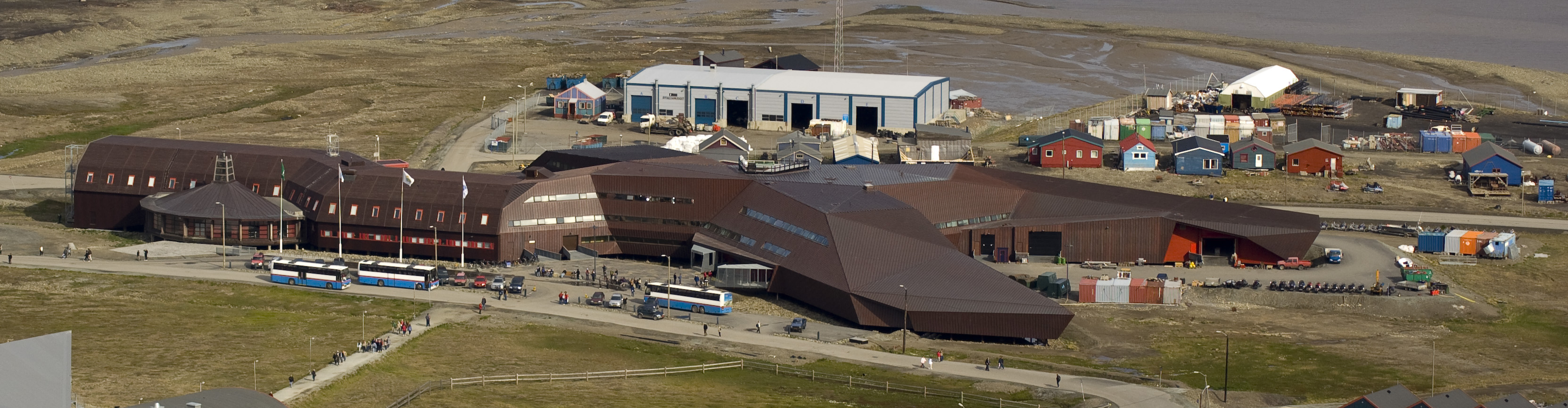 Gebäude des University Centre in Svalbard, Longyearbyen, Svalbard